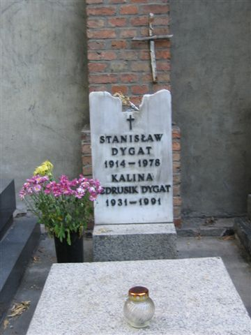 Stanisław Dygat's gravestone (Powązki Cemetery).